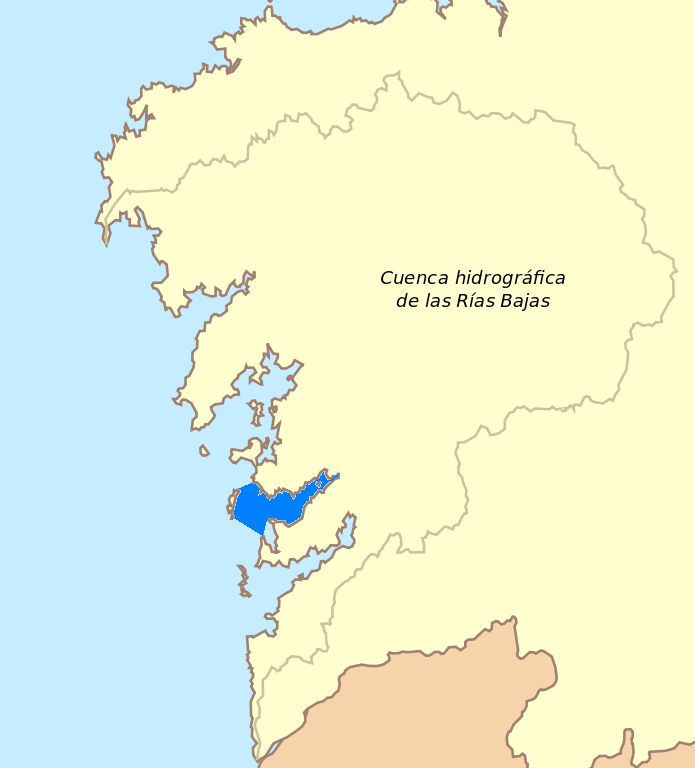 Ría de Pontevedra